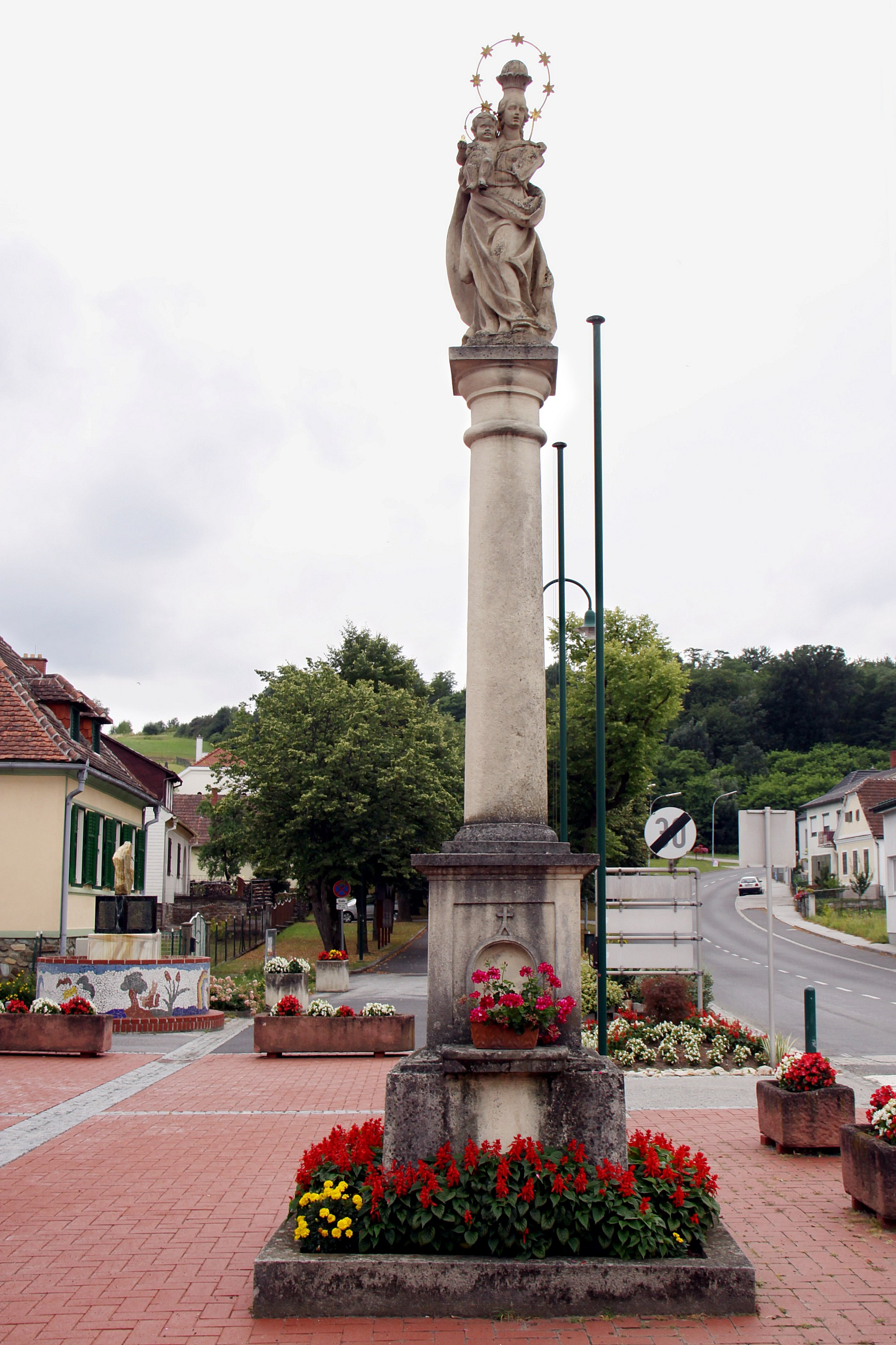 Denkmalgeschützter Figurenbildstock (Madonnenfigur) in Unterwart Object location47° 15′ 33.87″ N, 16° 14′ 03.64″ E